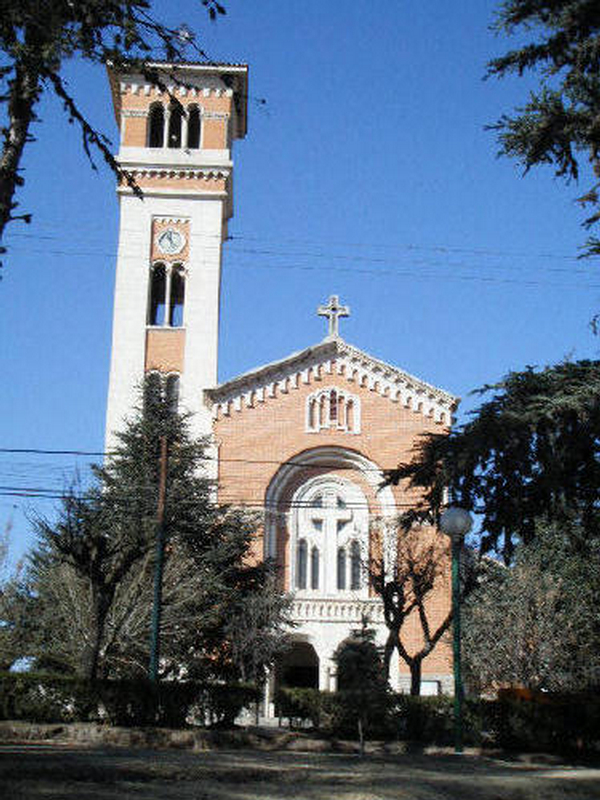 Parroquia del Santísimo Sacramento (1945-48), La Falda.